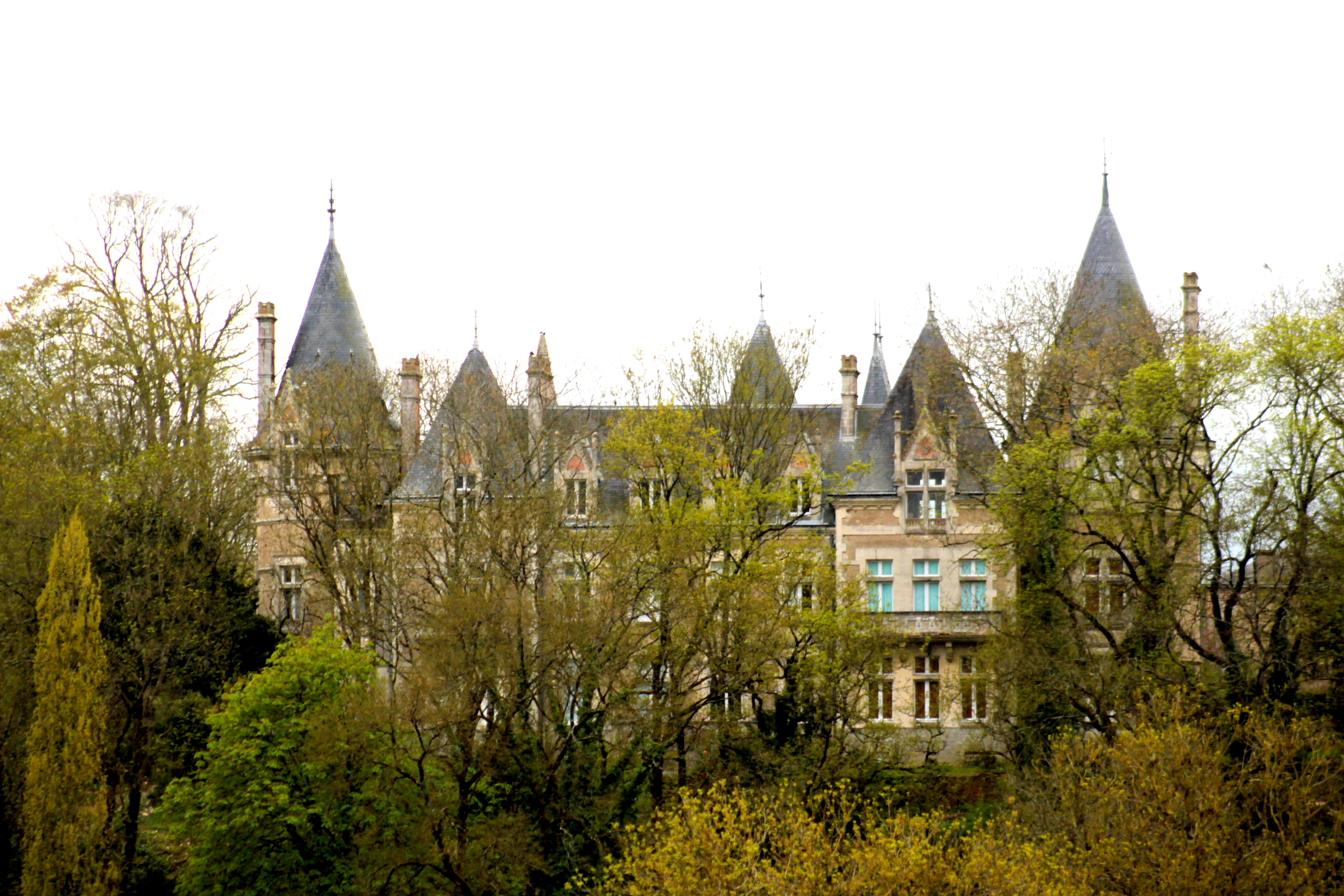 Château dela Touche, Fr-85-Rocheservière.